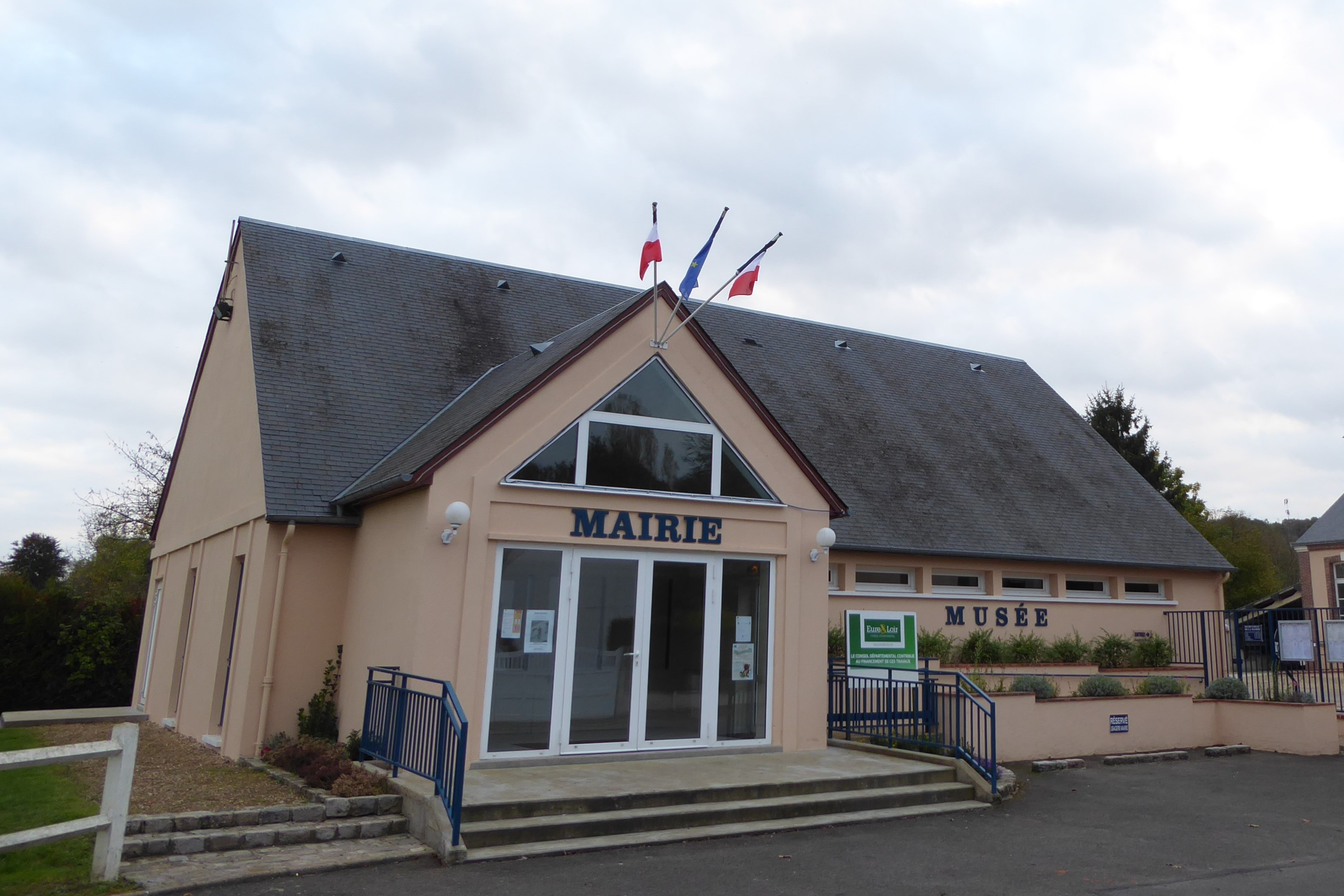 la mairie et le musée attenant, Charpont, Eure-et-Loir, France.